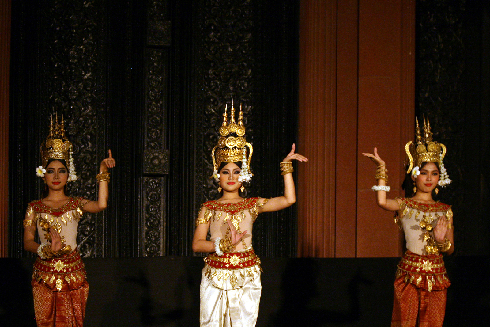 Spectacle des Enfants du Bassac à Phnom Penh